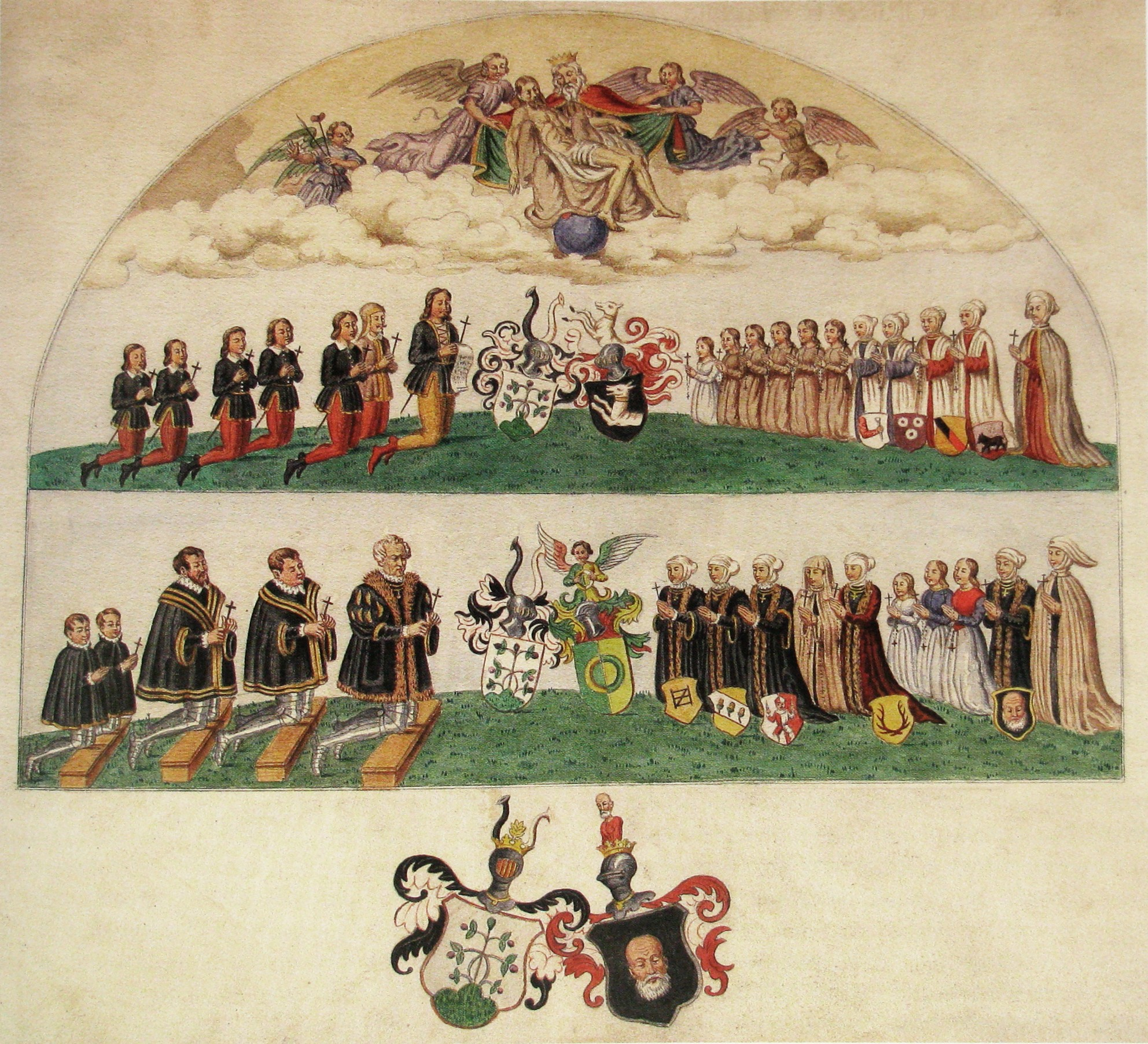 Ulrichskapelle Königswiesen; Stifterbild der Familie Weiler. Übertragung des Wandfreskos in der Kapelle auf Papier, kolorierte Zeichnung, um 1860. Unten wohl Hofmarksherr Caspar Weiler mit Familie, um 1580; darüber vielleicht Hans Wilhelm Weiler mit Familie, um 1610/20. Ganz unten Wappen der Weiler und der Barth. (Gerhard Schober)